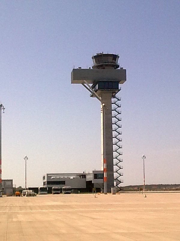 Tower Flughafen Berlin-Brandenburg Int. Ende April 2012